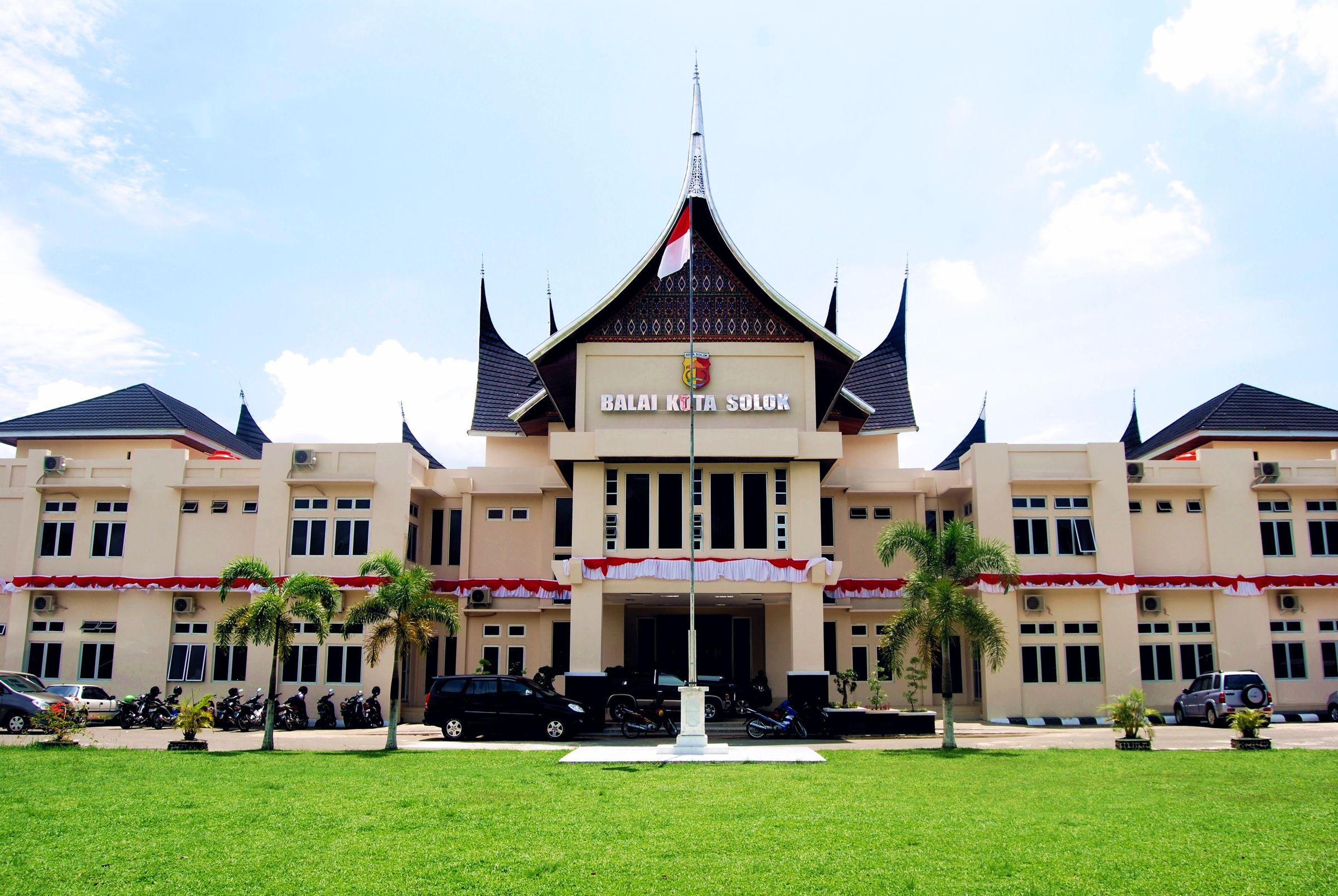 Kantor balai kota solok